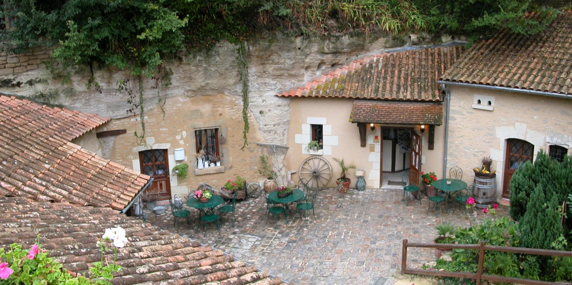 Habitations troglodytes à Rocheménier (Maine et Loire, France)